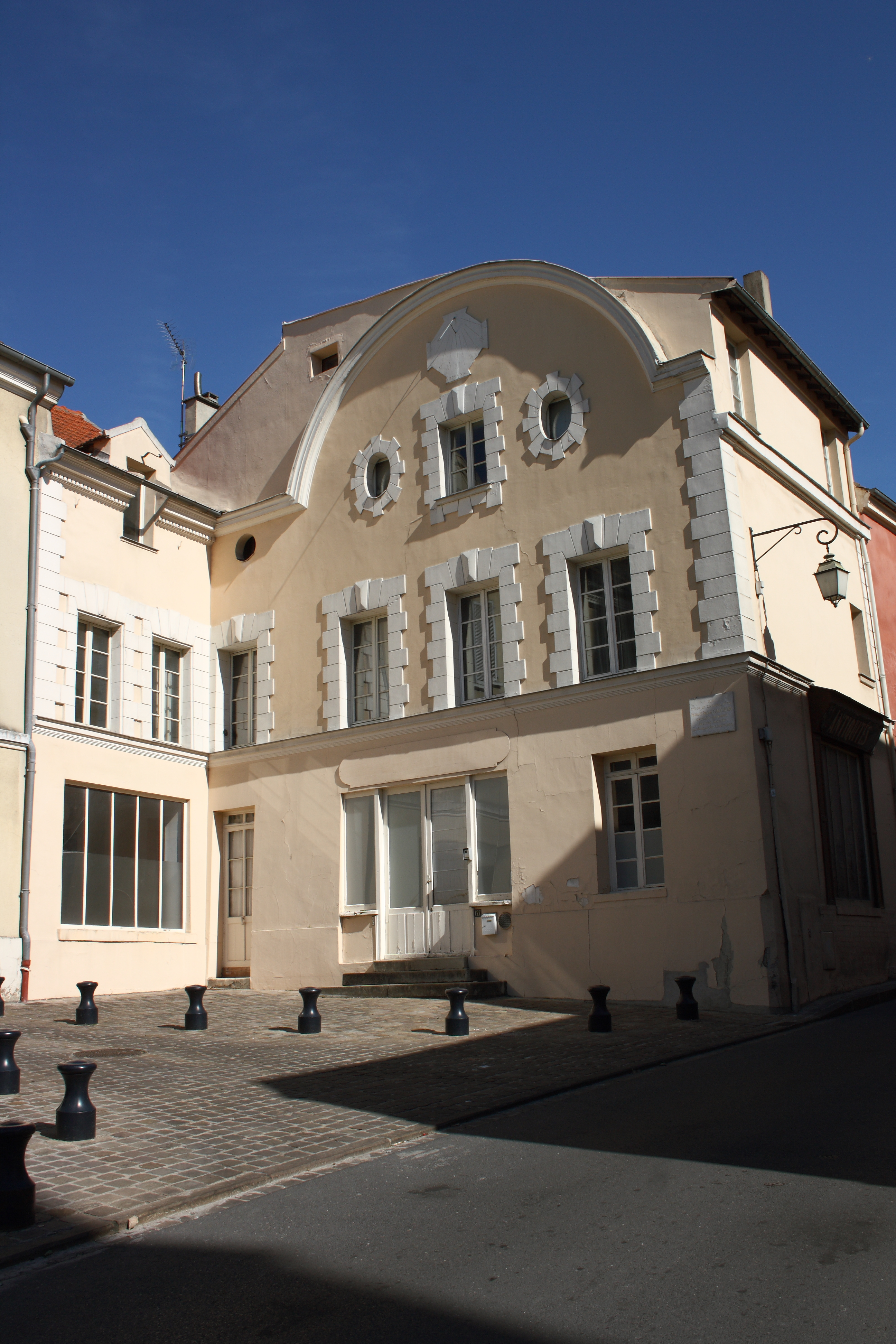 Hôtel de la Prévôté, Place de l'Eglise, in Cormeilles-en-Parisis im Département Val-d’Oise (Île-de-France)